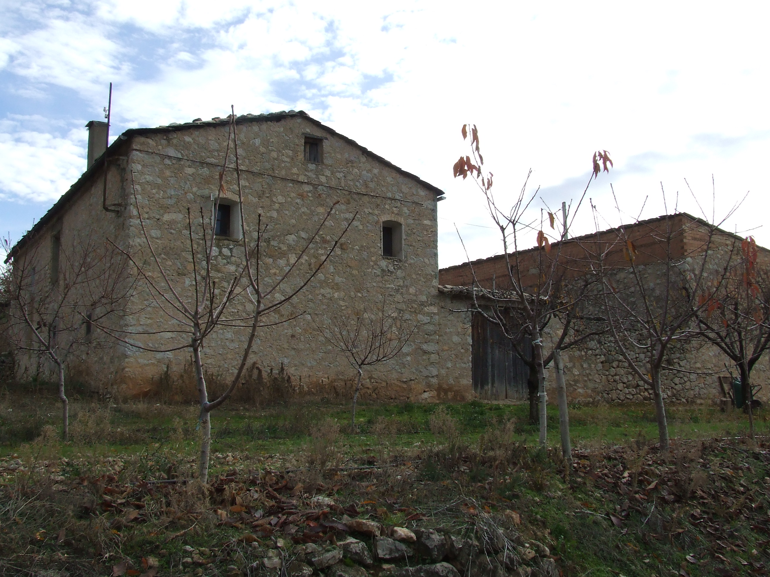 Cal Manjo (Abella de la Conca, Pallars Jussà)